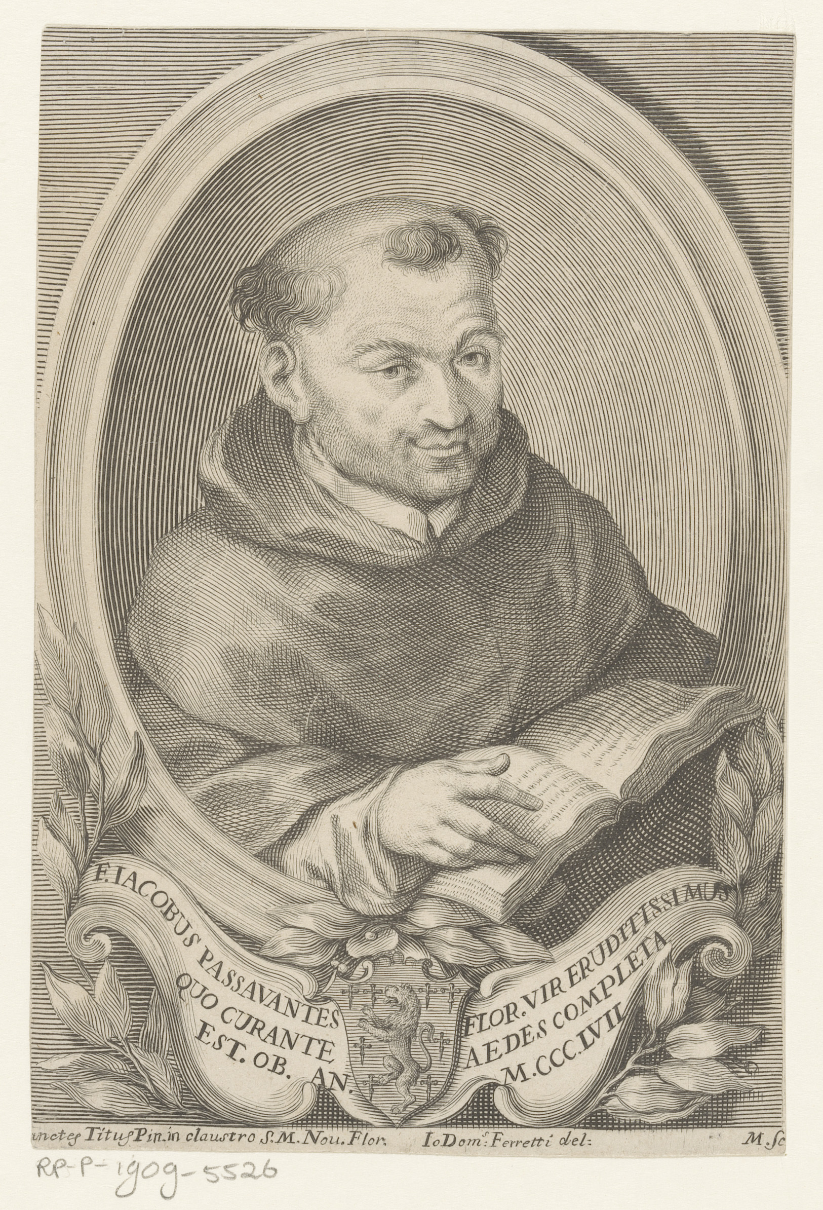 IdentificatieTitel(s): Portret van architect en schrijver Jacopo PassavantiObjecttype: prent Objectnummer: RP-P-1909-5526Opschriften / Merken: verzamelaarsmerk, verso, gestempeld: Lugt 2228VervaardigingVervaardiger: prentmaker: Monogrammist M (Italië) (vermeld op object)naar tekening van: Giovanni Domenico Ferretti (vermeld op object)naar schilderij van: onbekend (vermeld op object)Plaats vervaardiging: prentmaker: Italiënaar tekening van: Italiënaar schilderij van: FlorenceDatering: ca. 1700 - ca. 1799Fysieke kenmerken: gravureMateriaal: papier Techniek: graveren (drukprocedé)Afmetingen: blad: h 177 mm (binnen plaatrand afgesneden) × b 118 mm (binnen plaatrand afgesneden)OnderwerpWat: historical personswriter, poet, authorportrait, self-portrait of architectportrait of a writerWie: Jacopo PassavantiVerwerving en rechtenVerwerving: aankoop 1905Copyright: Publiek domein